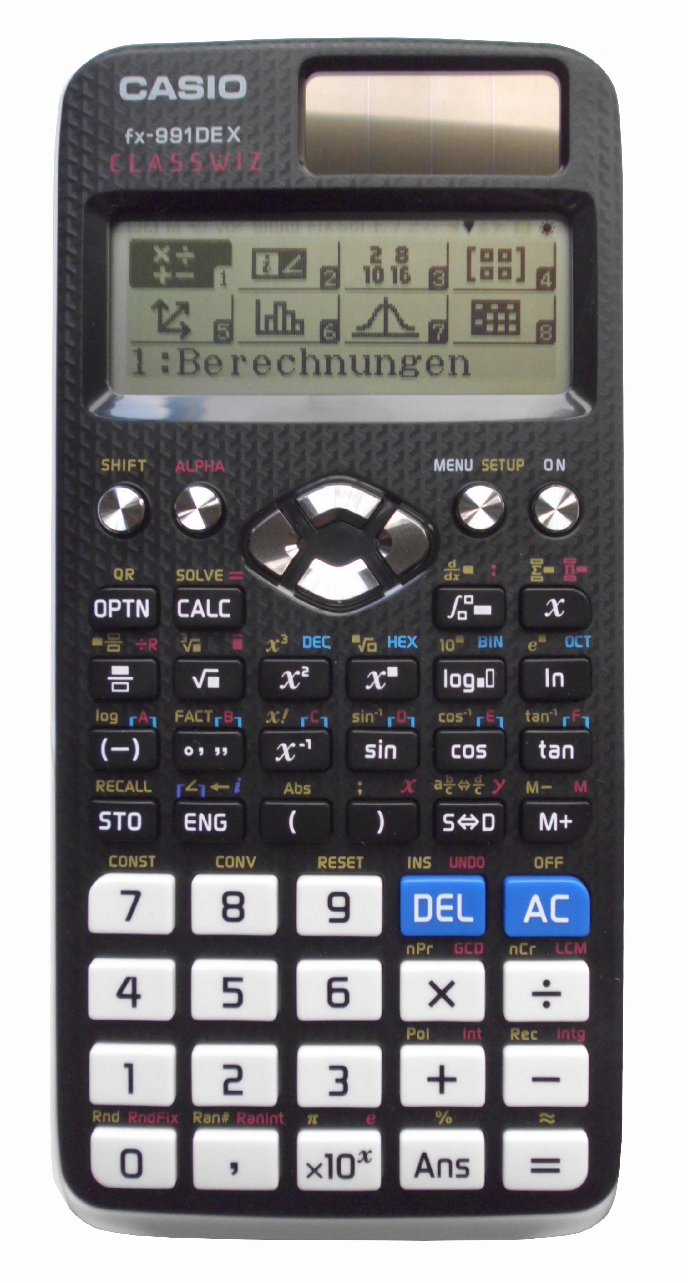 Casio fx-991DE X Scientific Calculator